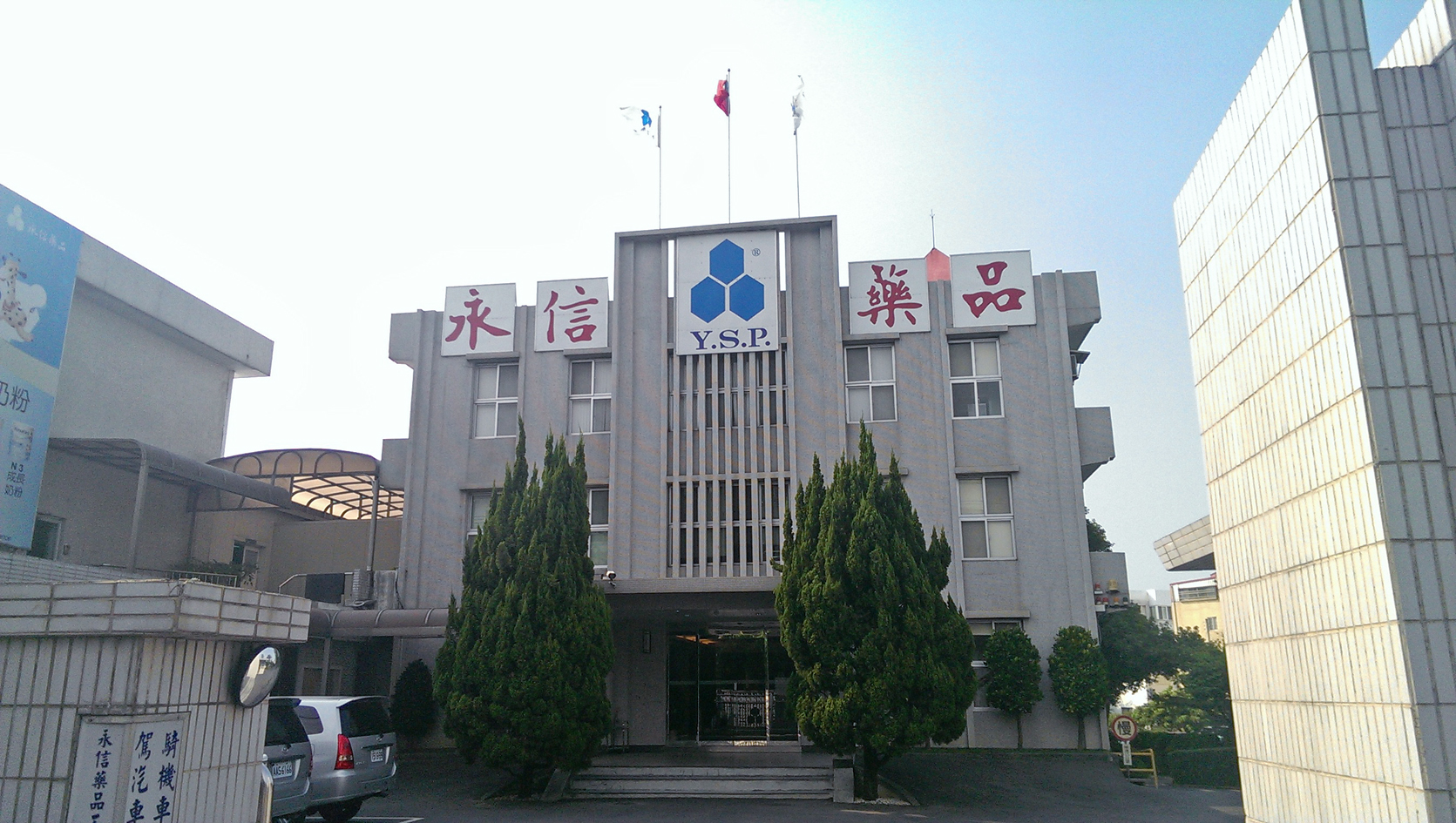 中文（台灣）: 永信藥品總部及頂店廠，位於臺中市大甲區中山路一段1191號。